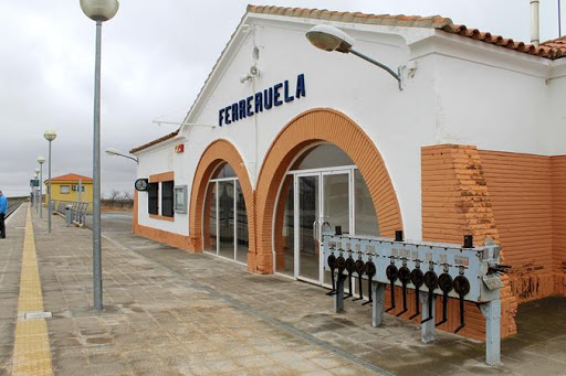 Estacion de ferrocarril de Ferreruela de Huerva. La imagen muestra el edificio de viajeros (construido en 1933) del andén lateral.